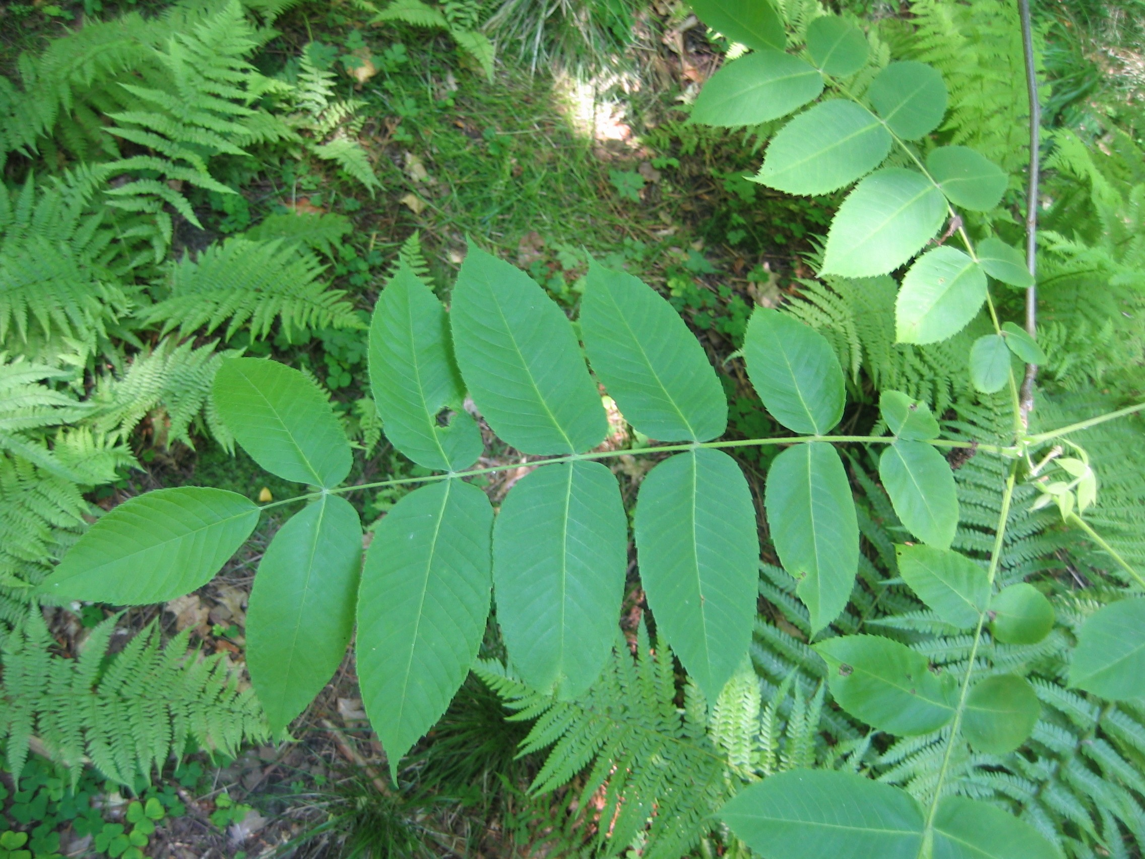 Juglans cinerea, fotografaĵo de folioj